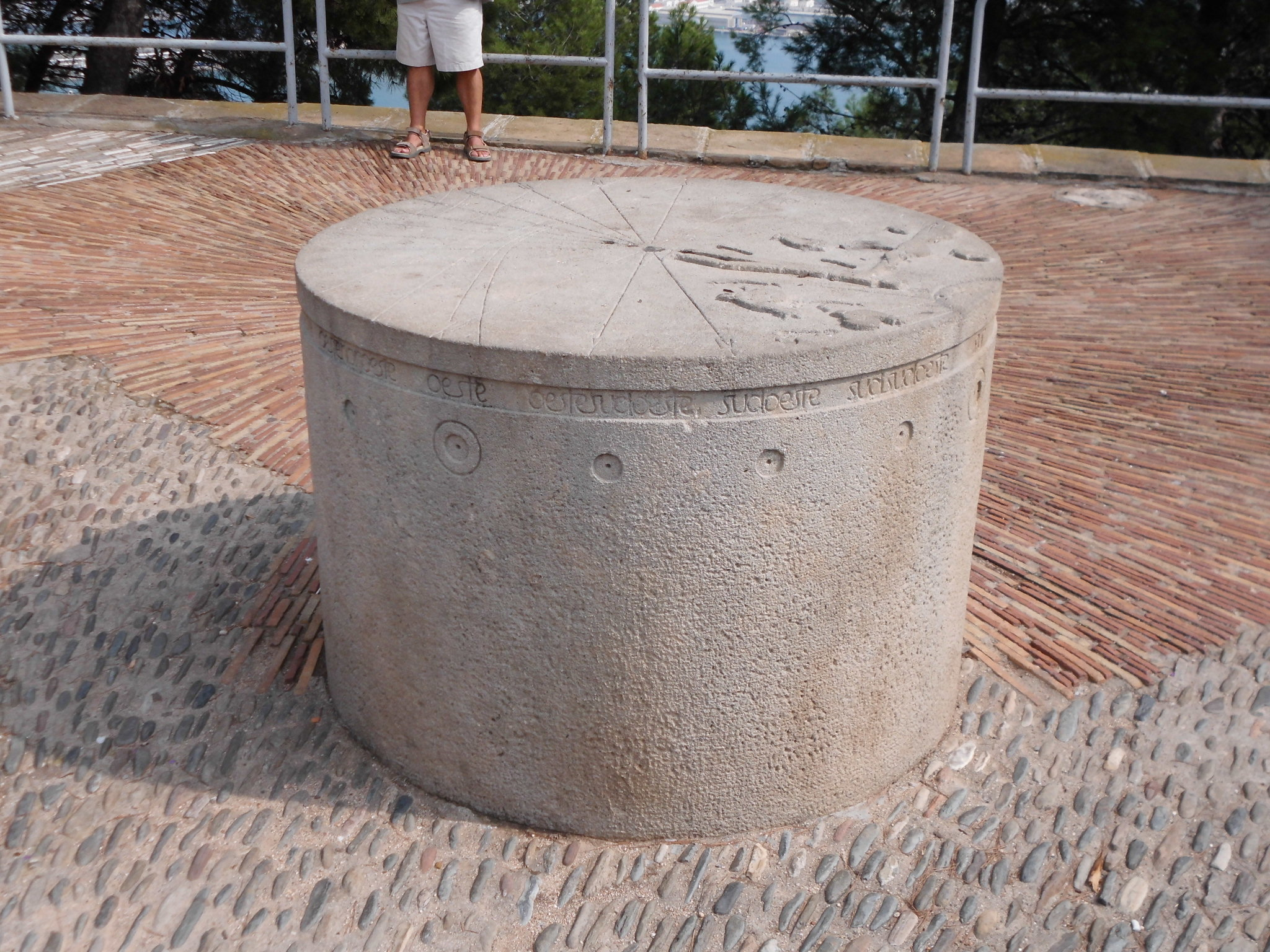 Rellotges de sol (Julià Riu i Serra). Castell de Montjuïc (Barcelona)